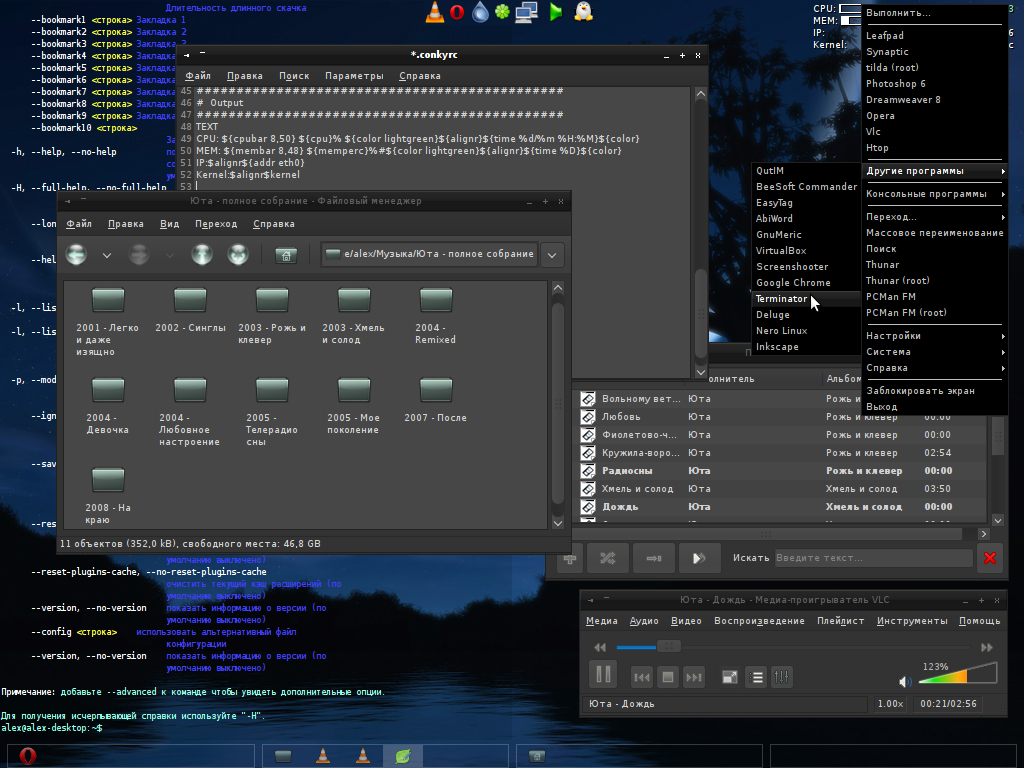 Captura de pantalla de un escritorio Openbox